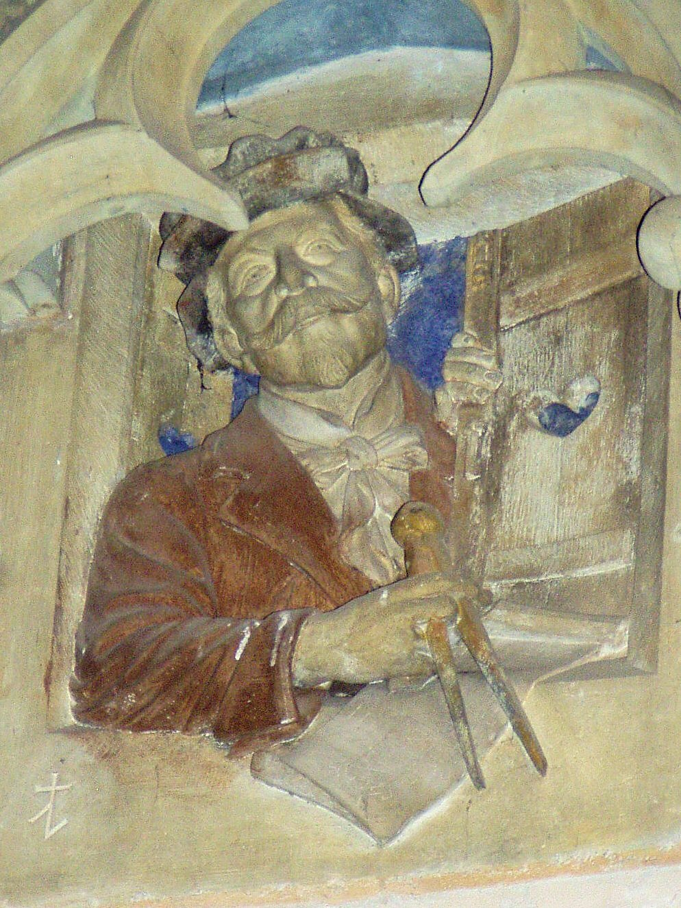 Selbstdarstellung des Architekten Leopold Oelenheinz (Marienkirche zu Königsberg in Bayern)